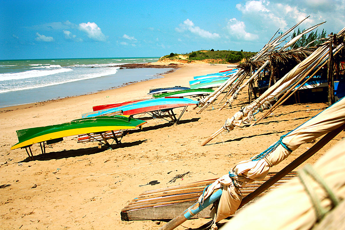 Bem, não é uma lagoa, é uma praia mesmo... que se chama Lagoa do Sal e fica do lado de Cajueiro em Touros/RN. Um lugar muito lindo!!! Eu ia mandar essa imagem para um concurso fotografico das praias aqui do Estado, mas eu achei que ela não merecia, mesmo não tendo visto as concorrentes até hoje... enfim!!!! Abraço a todos os visitantes!!! =D